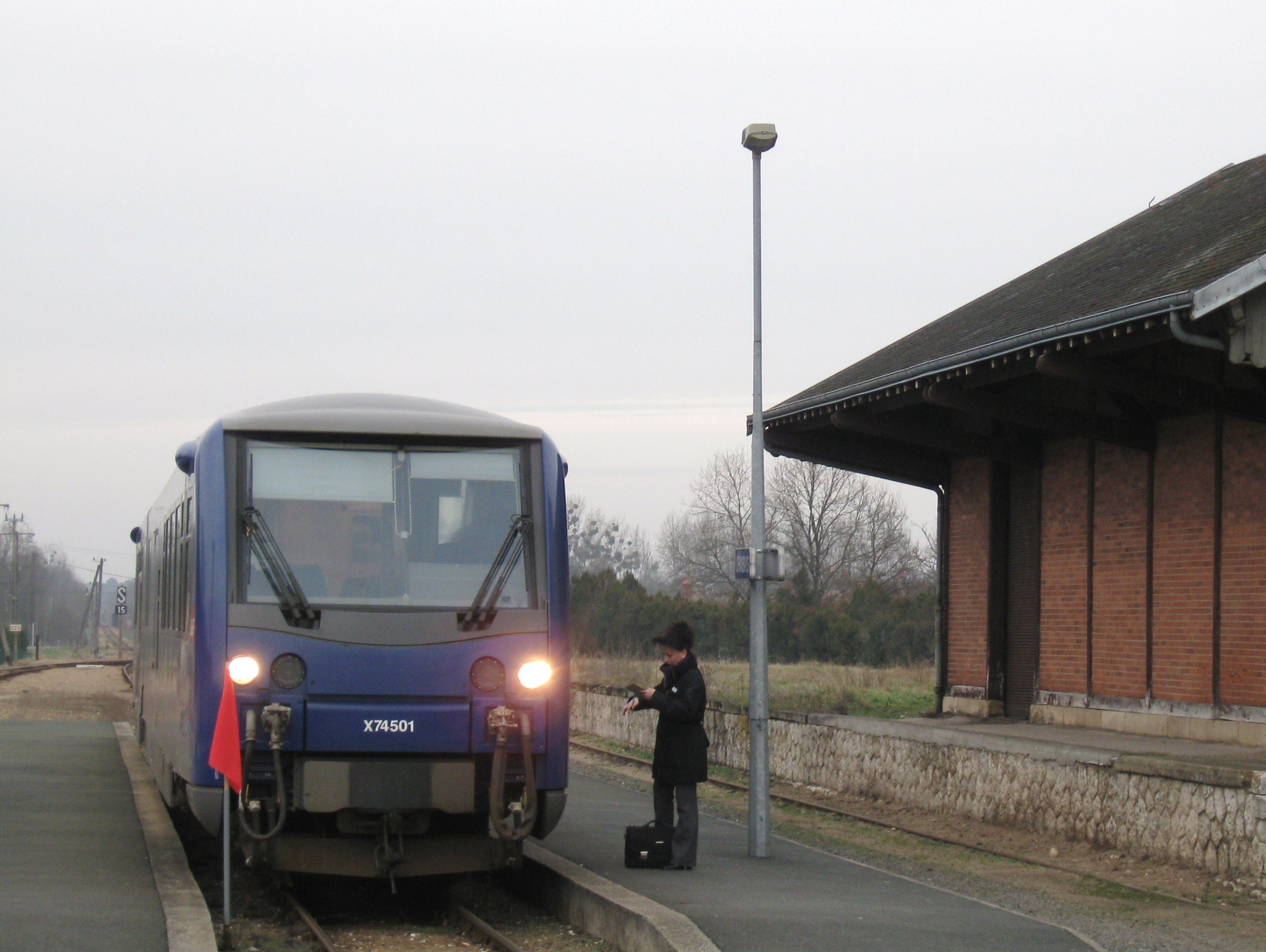 Autorail X 74501 (TER Centre), en gare de Chabris (chemin de fer à voie métrique du Blanc-Argent), Indre, France